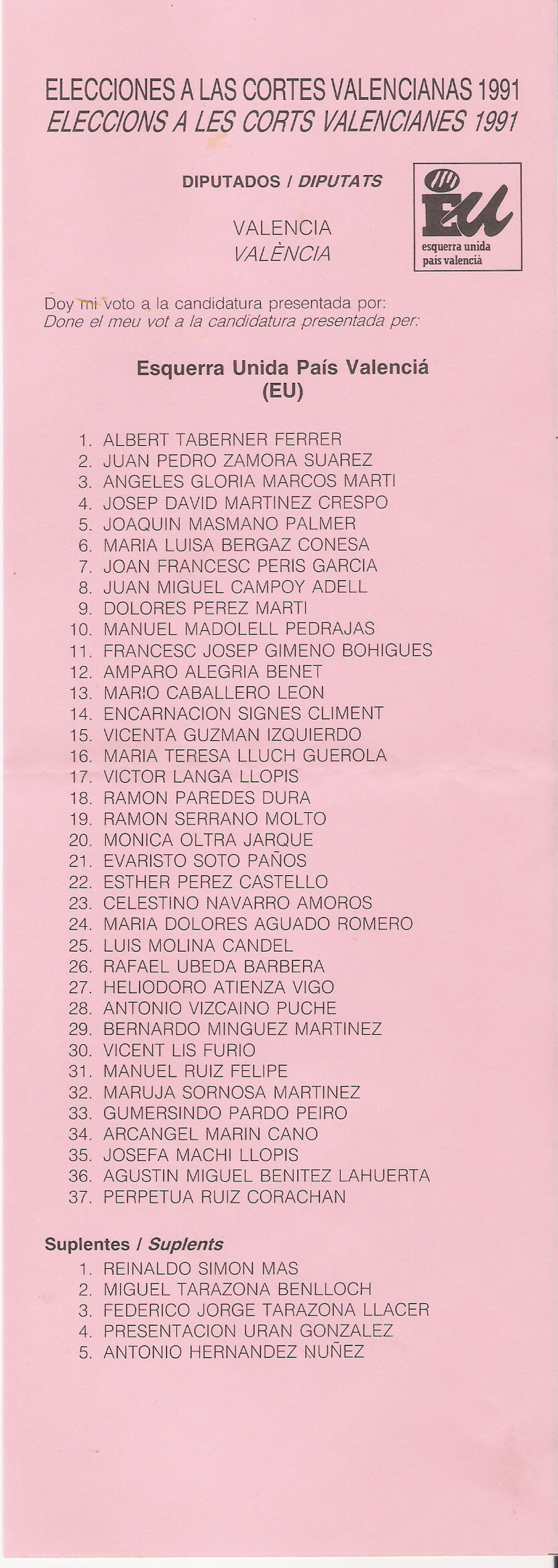 Papeleta electoral de la coalición Esquerra Unida del País Valencià por la provincia de Valencia para las Cortes Valencianas, en 1991.